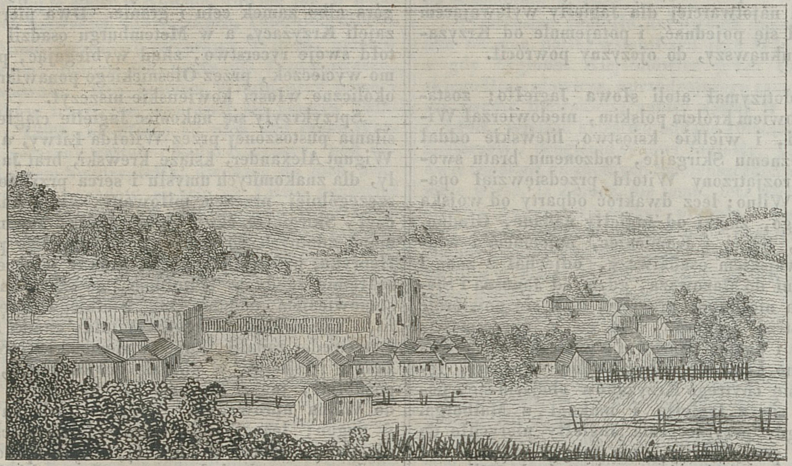 Беларуская (тарашкевіца): Крэва (Kreva). Замак